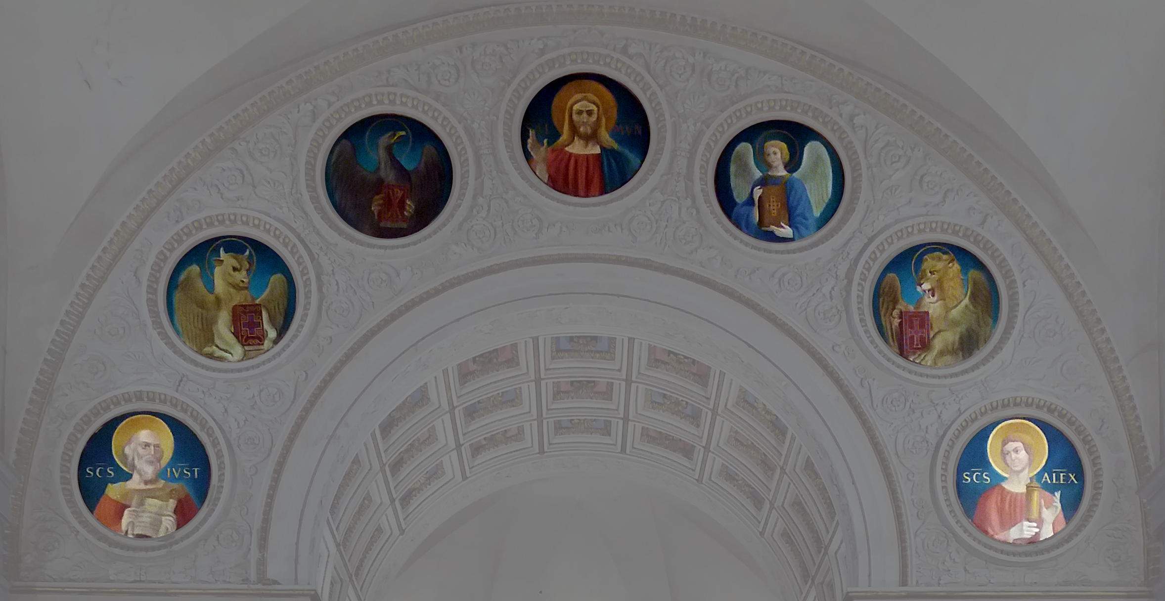 Médaillons de l'arc triomphal, côté nef : saint Just, saint Luc (bœuf), saint Jean (aigle), Christ, saint Mathieu, saint Marc (lion), saint Alexandre (martyr de 178).